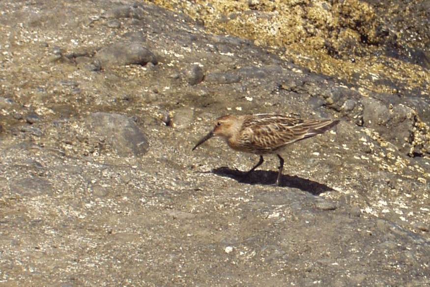 Beschreibung: Alpenstrandläufer (Calidris alpina) Ort: La Gomera, Spanien Fotograf: Olaf Mertens, 19. September 2003